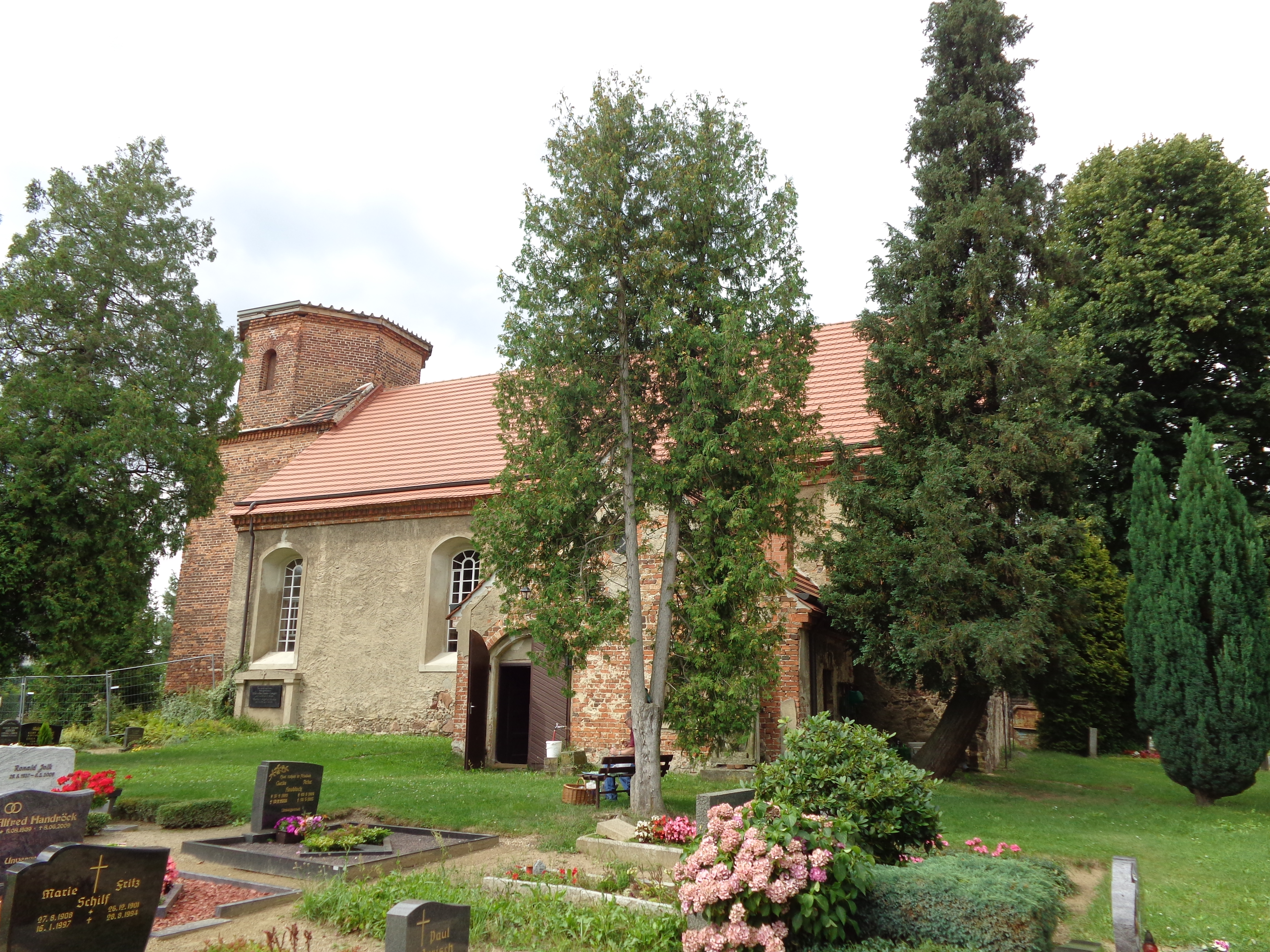 Dortfkirche Laubst, Ortsteil Laubst, Stadt Drebkau, Landkreis Spree-Neiße, Brandenburg, Südseite